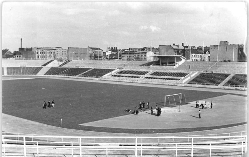 Berlin, Ulbricht-Stadion Zentralbild Schack 23.5.51 Berlin 1951. UBz: Blick in das "Walter-Ulbricht-Stadion".